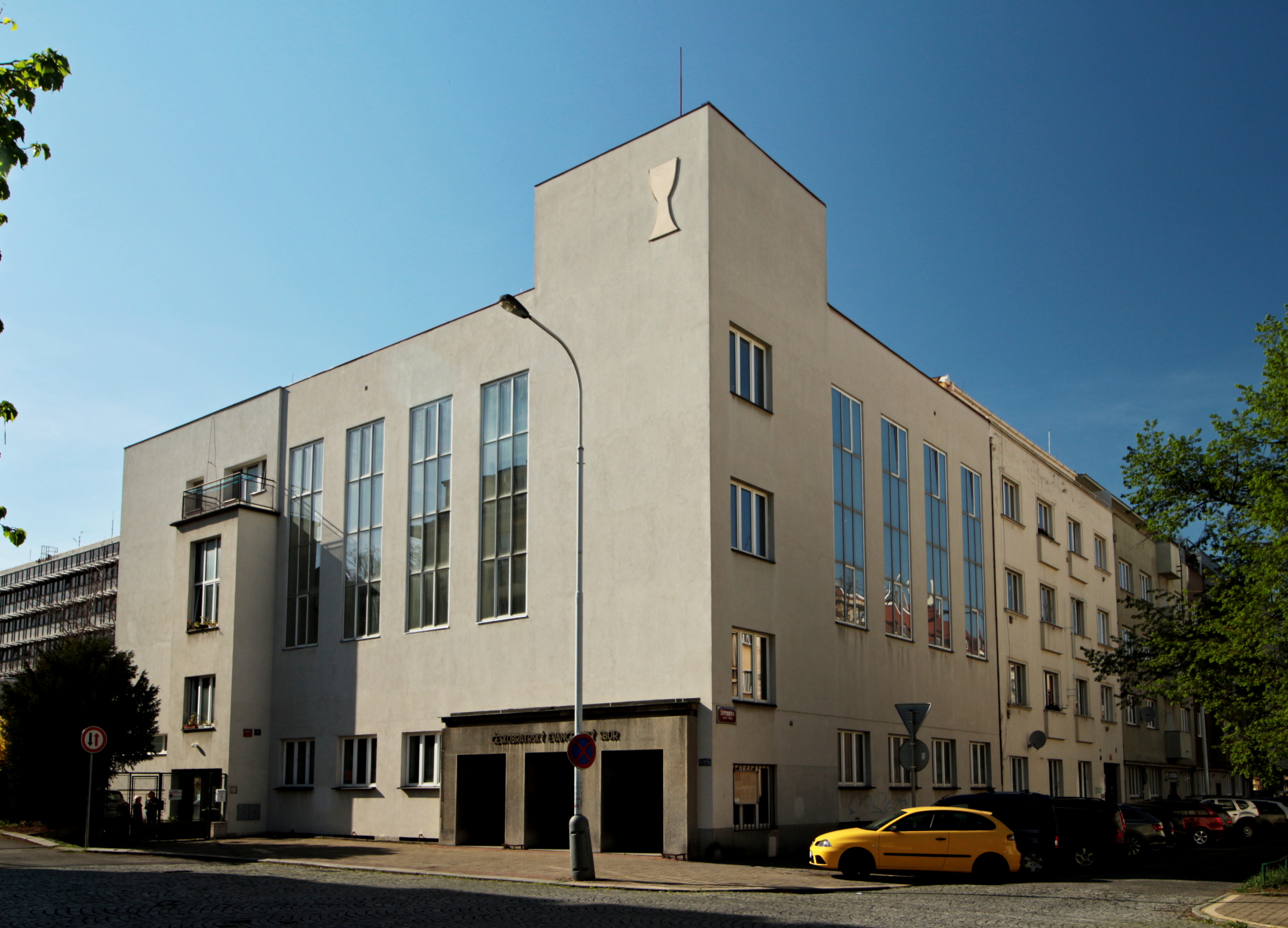 Sbor ČCE Nusle